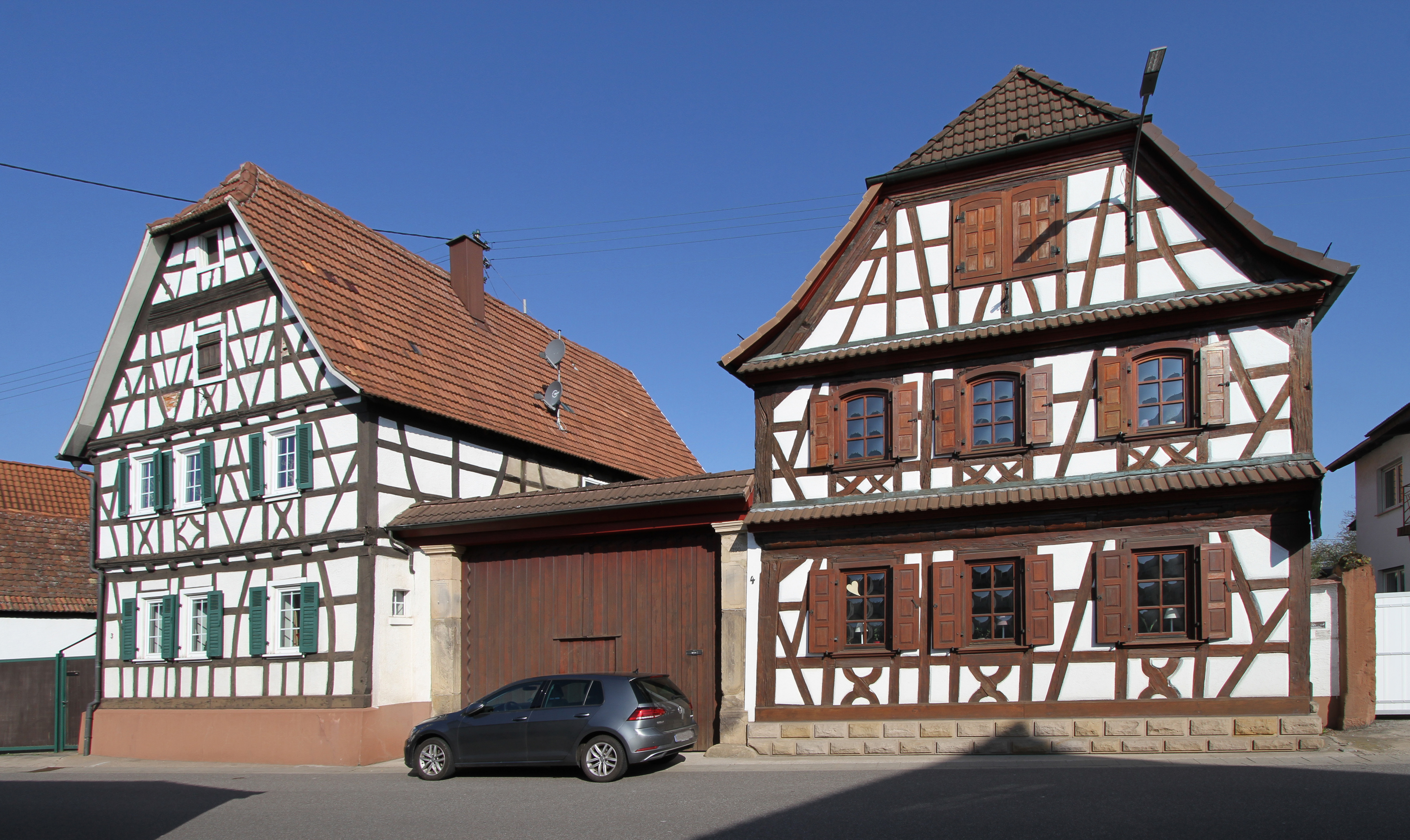 Rohrbach (Pfalz)